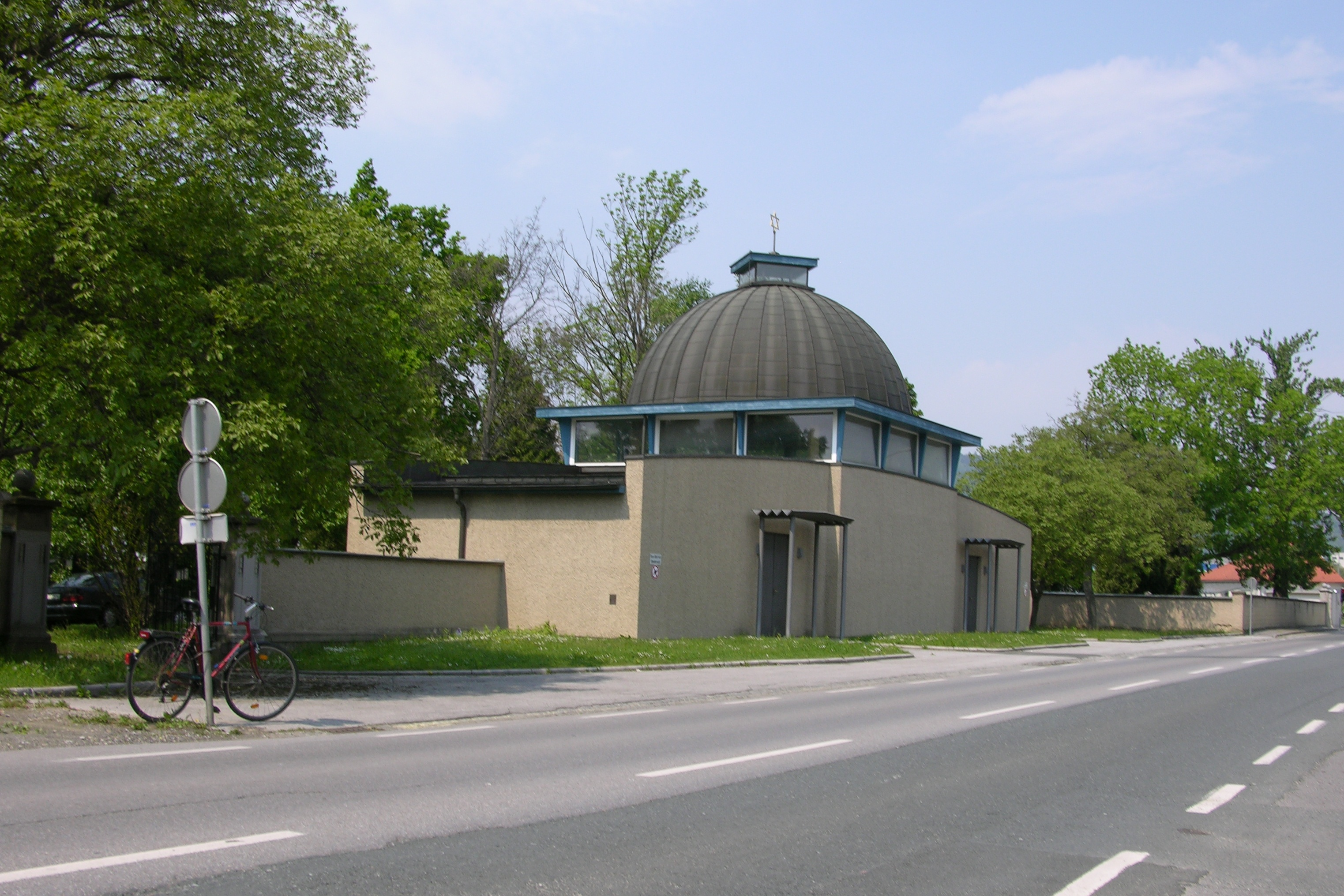 Eingang um Israelitischen Friedhof in Graz, Wetzelsdorf